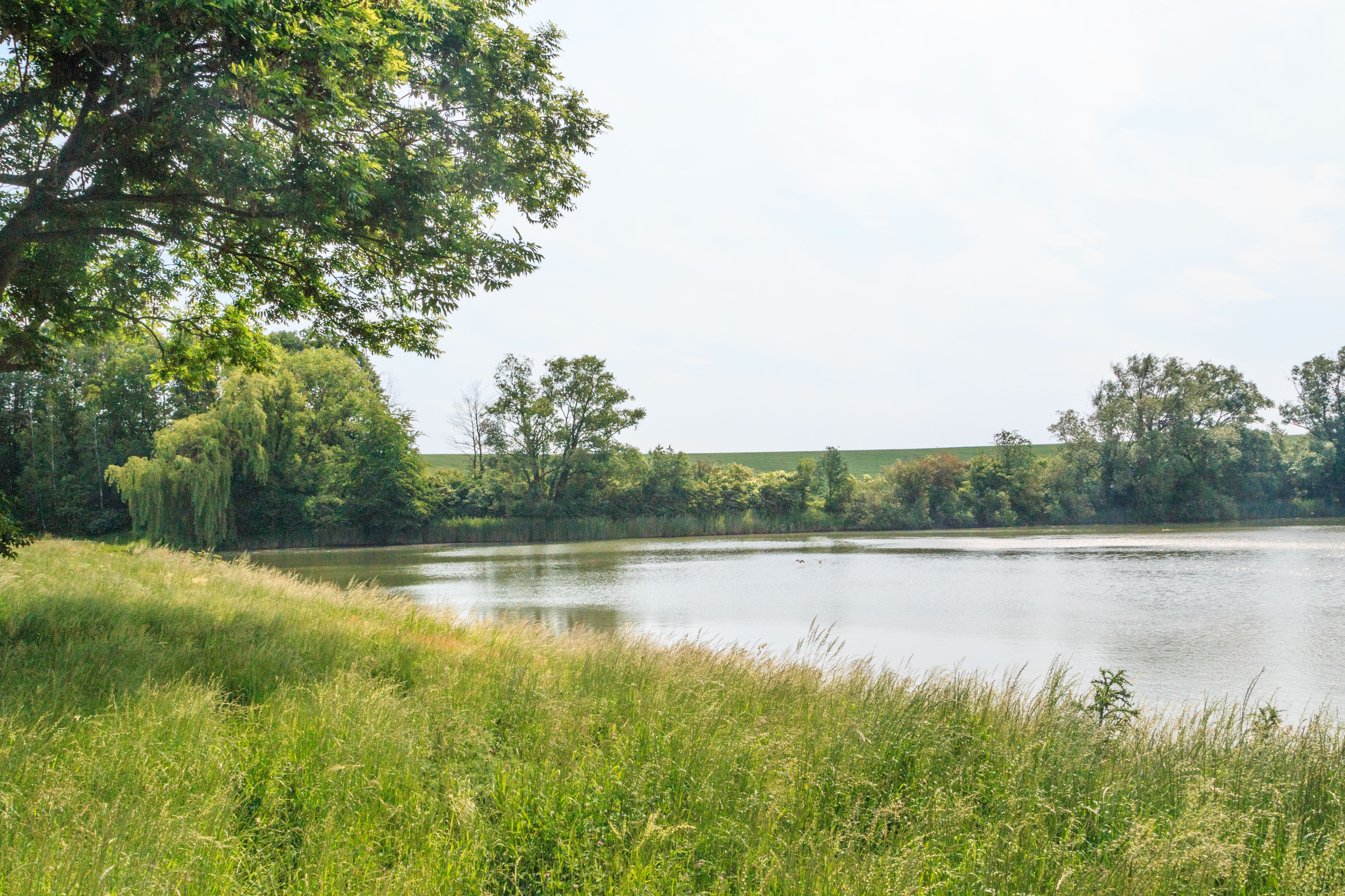 Sběřský rybník Project: Vodstvo.